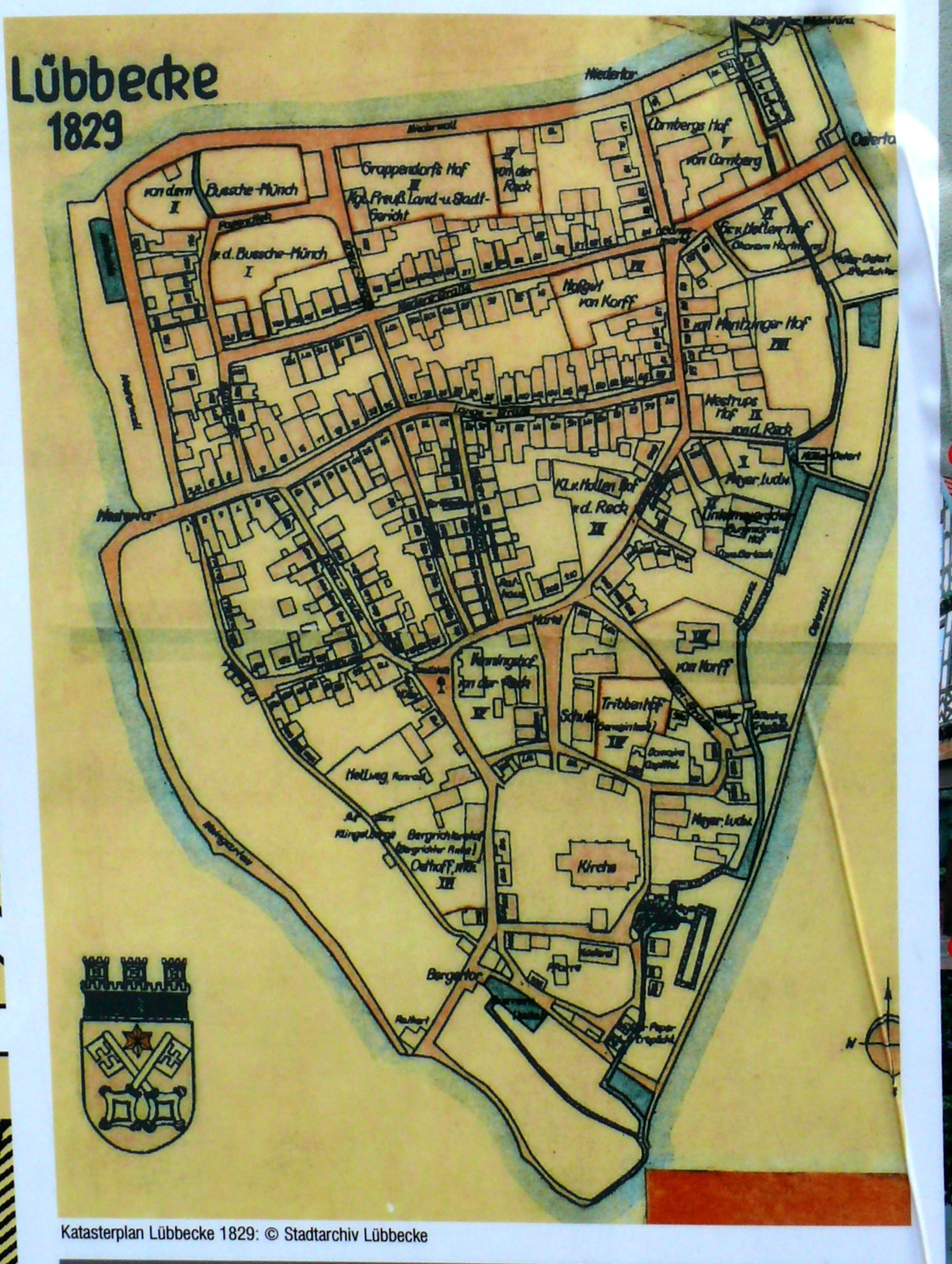 Stadtplan von 1829, Informationstafel am Gänsemarkt